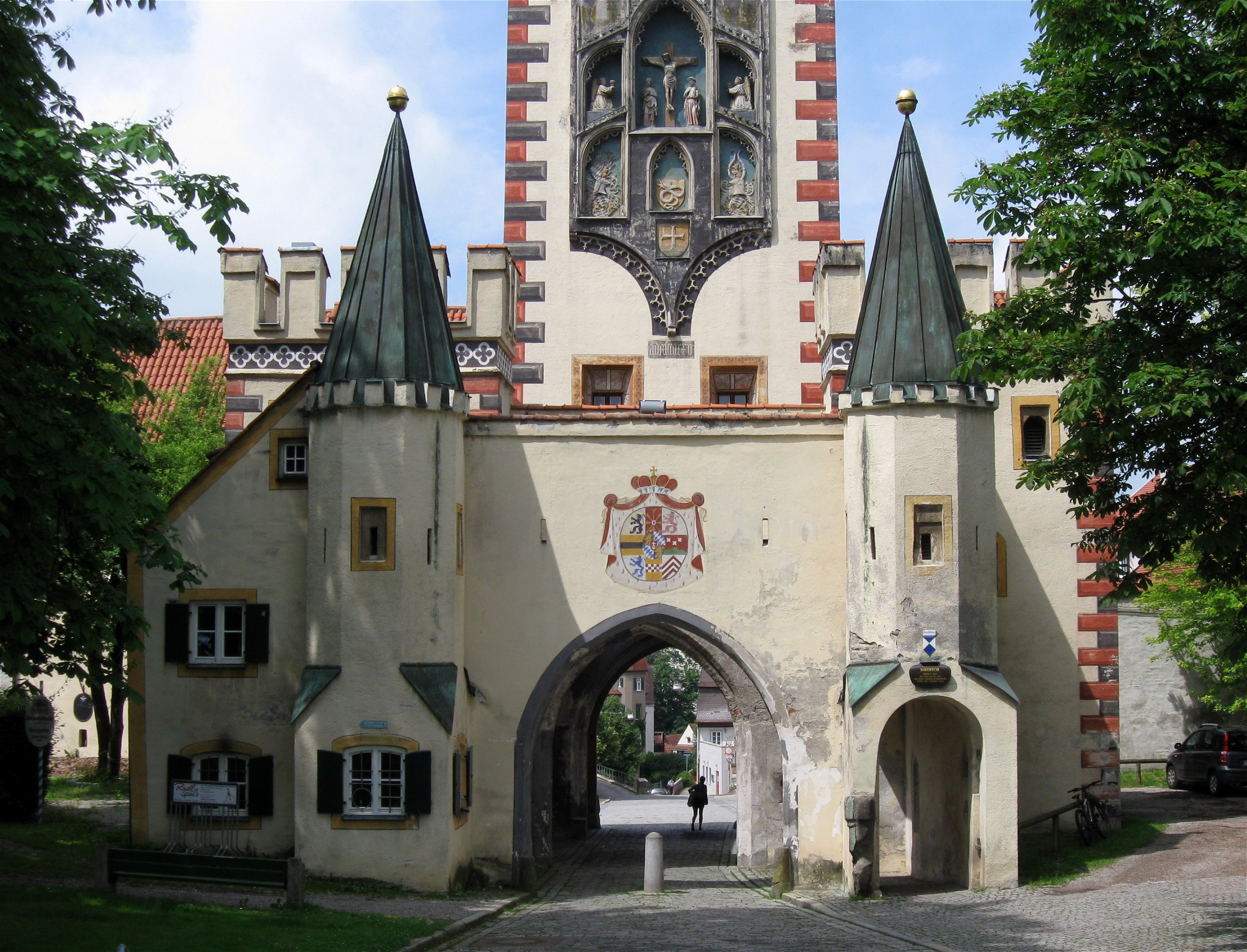 Alte Bergstraße 448; Bayertor oder Münchner Tor, Stadttor, Haupttorturm, mehrgeschossiger Turm über quadratischem Grundriss mit spitzbogig geöffneter Torhalle und Eckquaderung, bezeichnet mit dem Jahr 1425